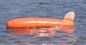 Sicherheitsboje für das Orientierungstauchen, zu Veranschaulichung der Spurfinne auf die Oberseite gelegt, Marke Eigenbau (nicht von mir)